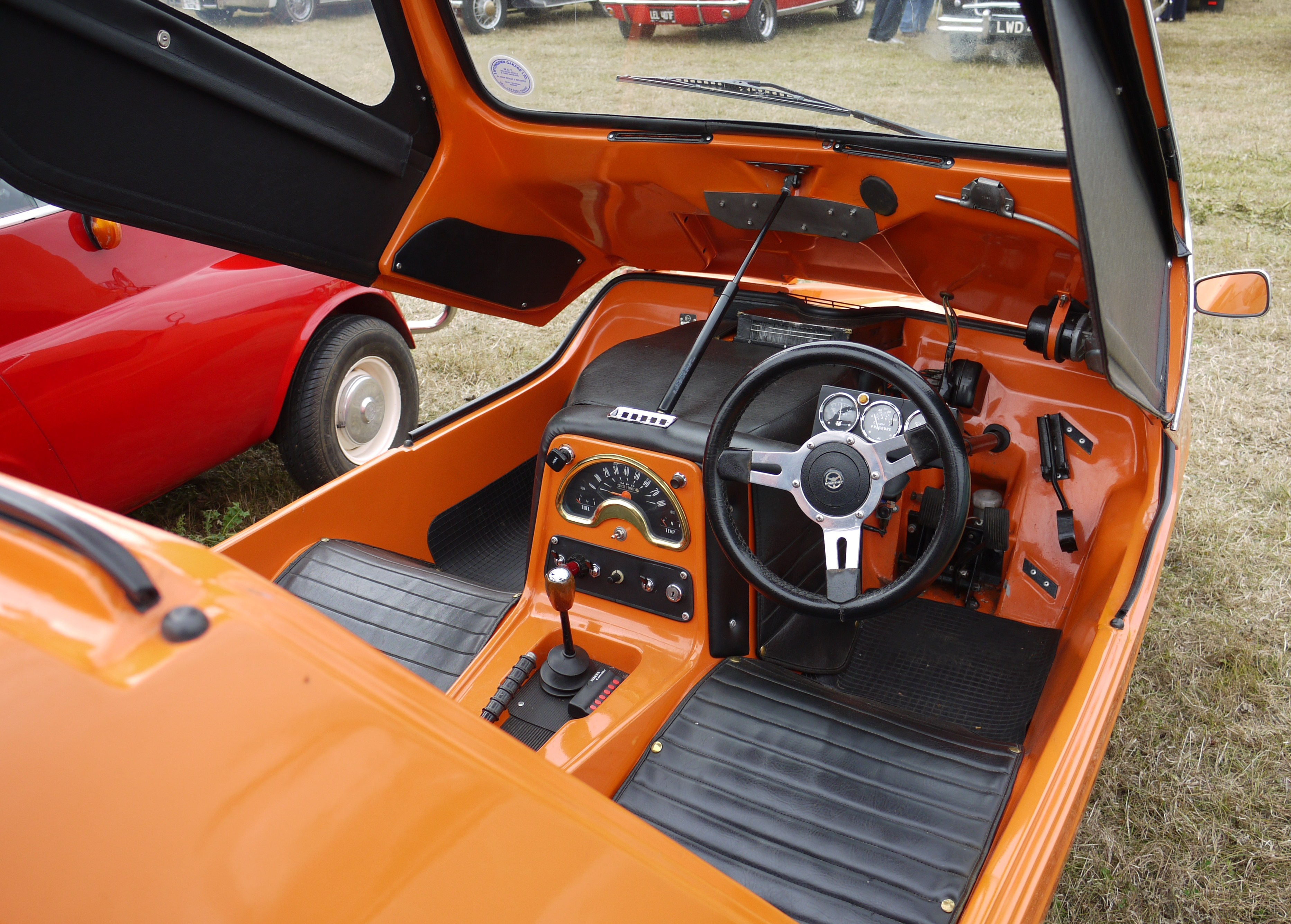 Panasonic G1 14-45 Lens